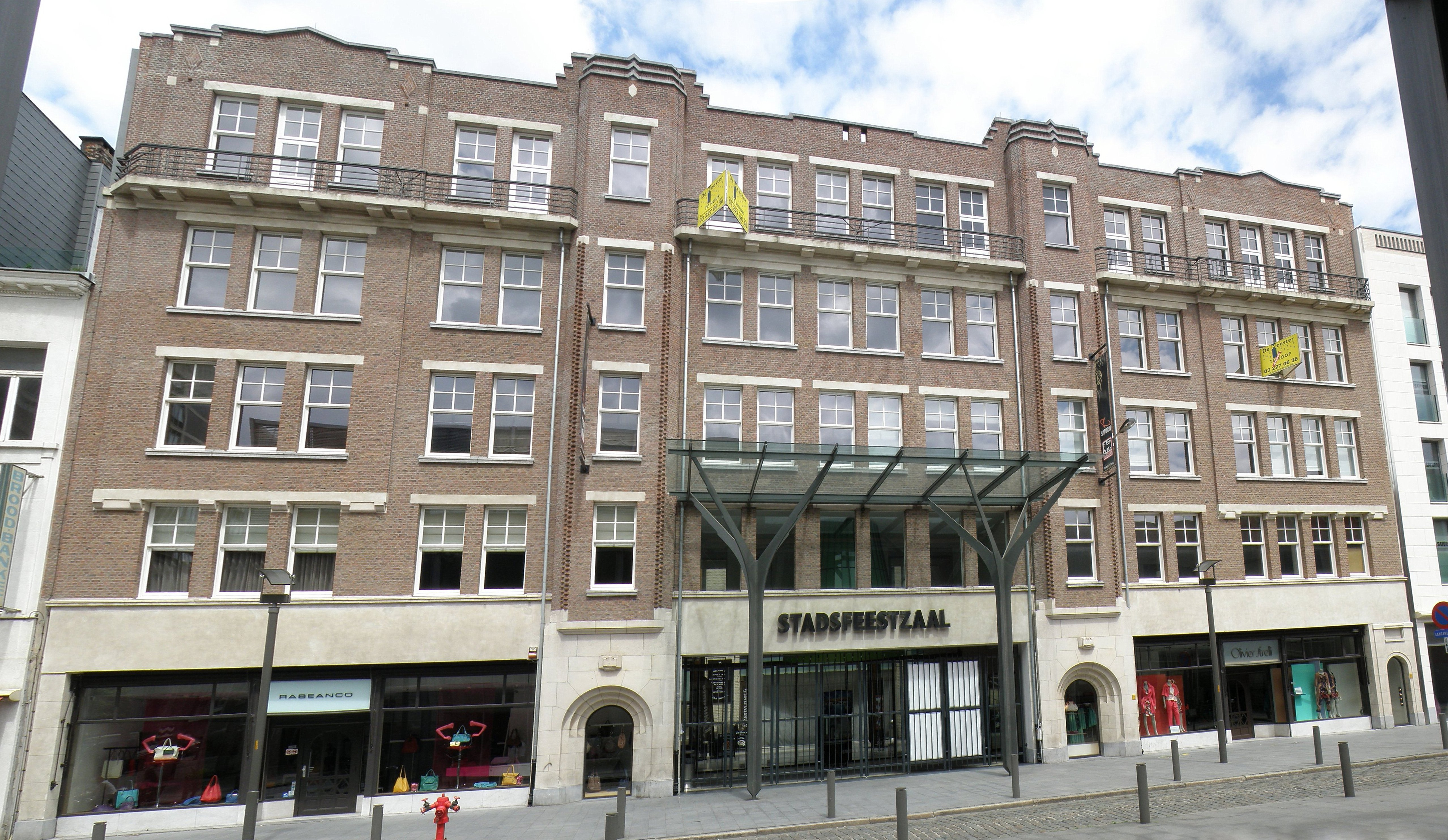 Anvers, Belgique. Immeuble à appartements, sis rue Hopland n°35-37. Plans dessinés par Emile van Averbeke, 1921.